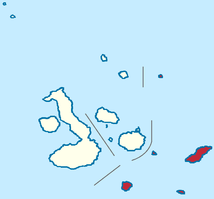 Mapa localizacor del cantón en Galápagos, Ecuador